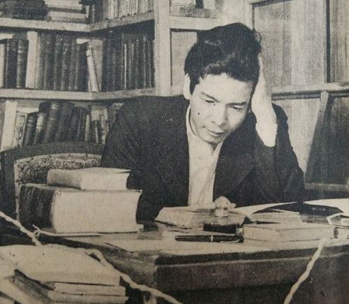 花田清輝